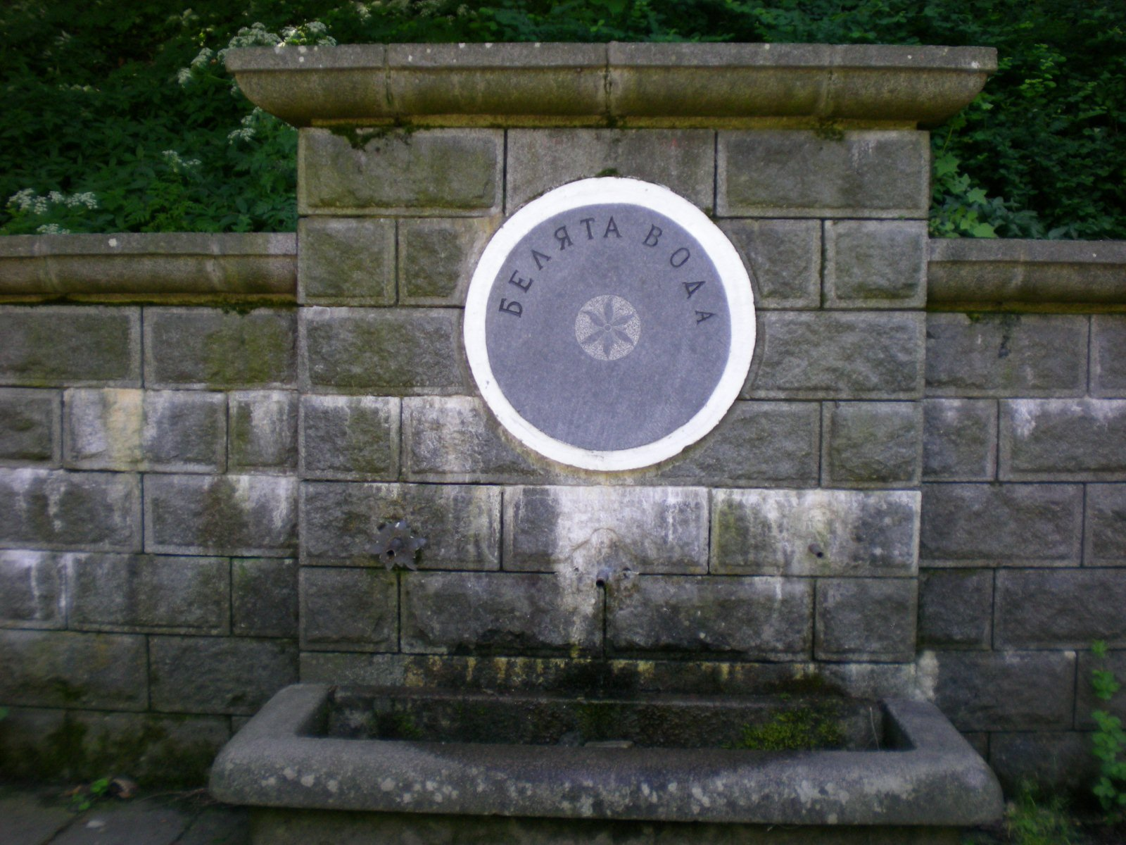 природен парк „Витоша“, Витоша